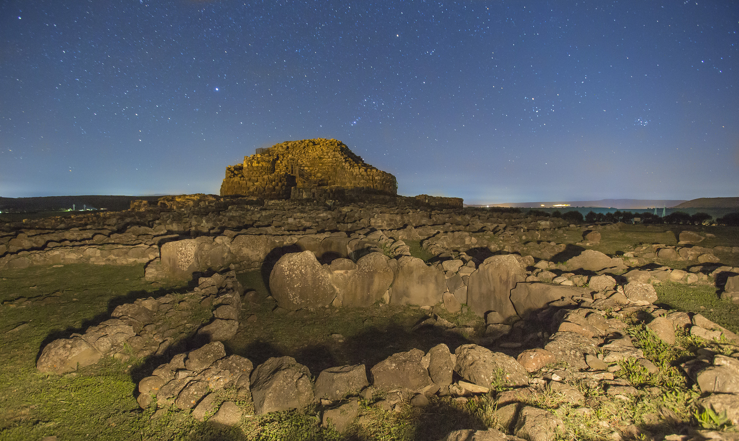 Complesso archeologico Su Nuraxi - MIBAC This is a photo of a monument which is part of cultural heritage of Italy.